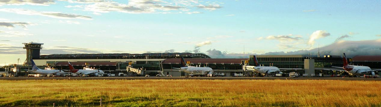 Aeropuerto SJO. Reestructuración año 2.000. Vista posterior en área de pistas y mangas de abordaje